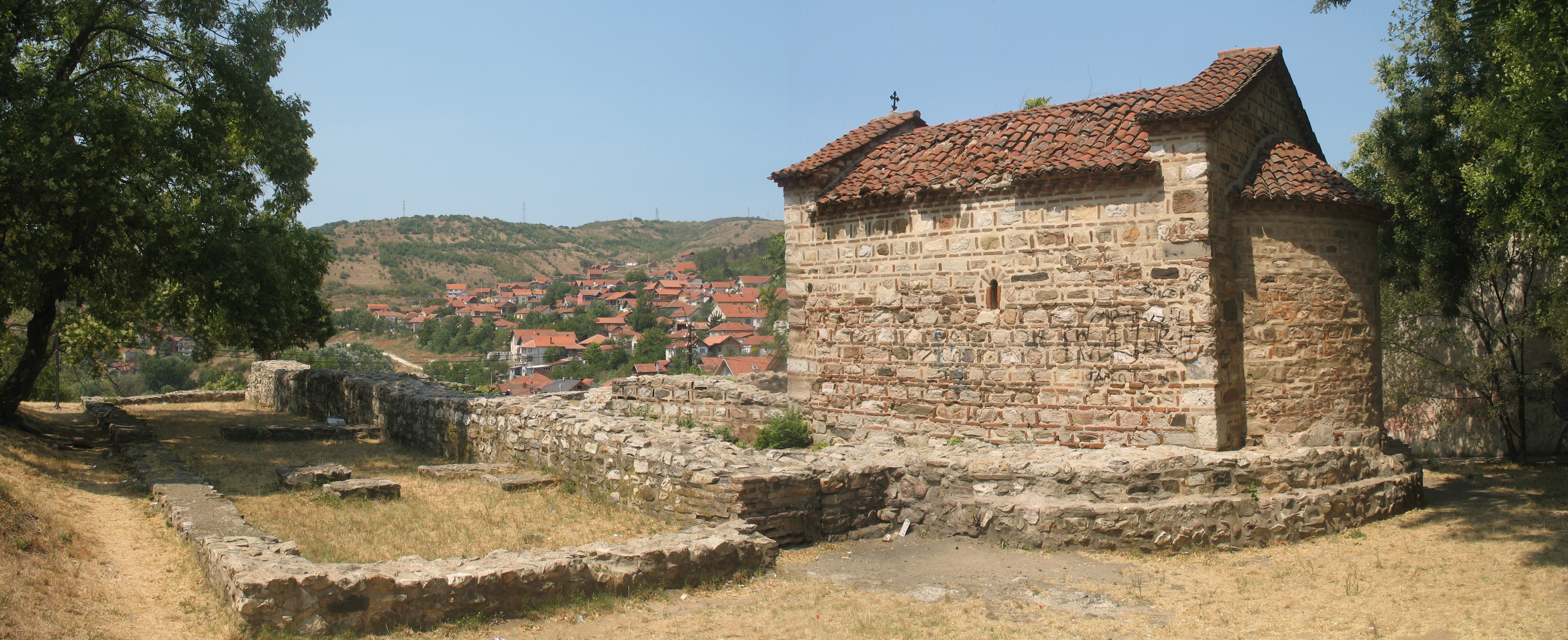 "Latin" church in Prokuplje